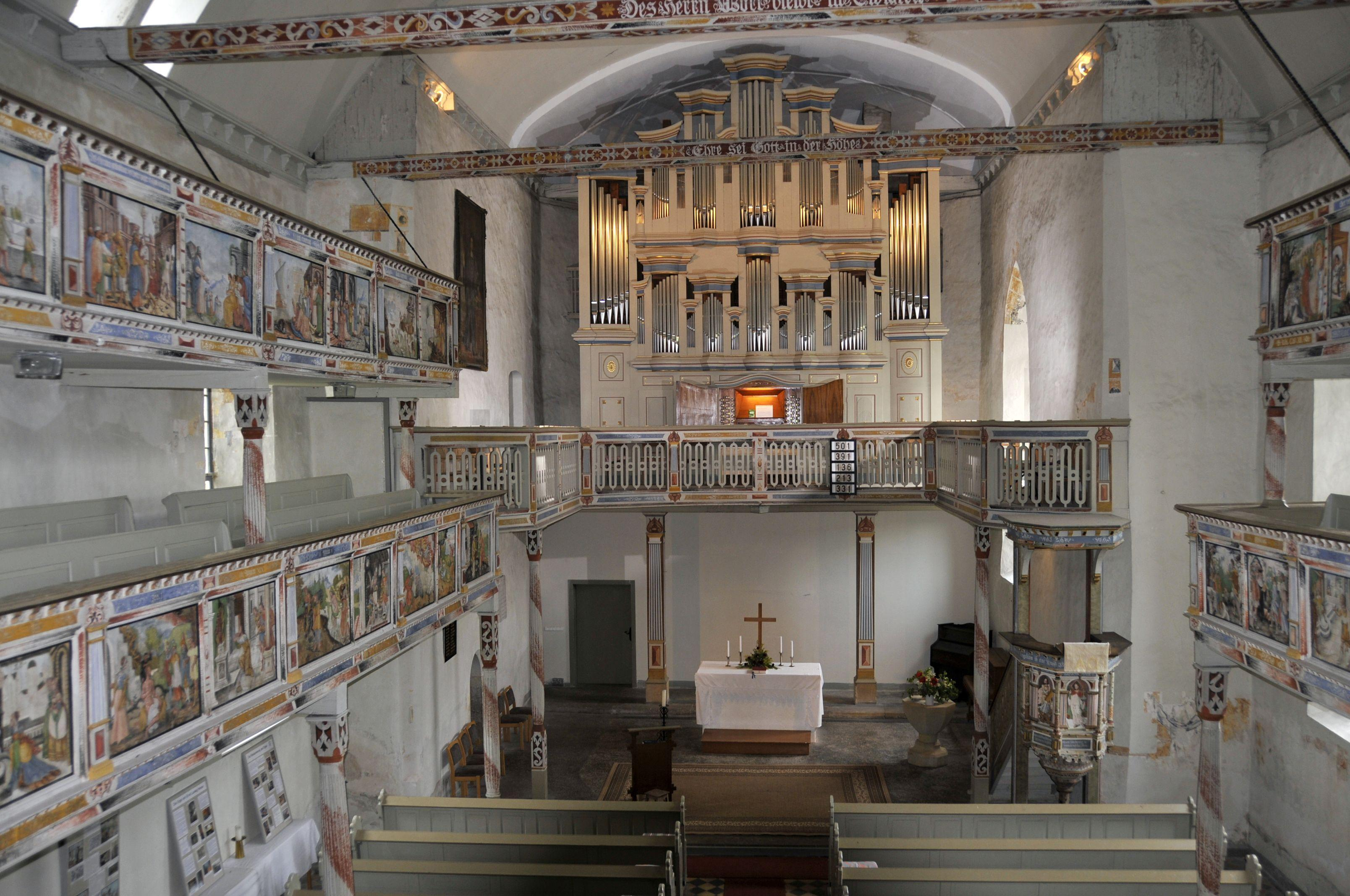 Kirche von Seebergen (Thüringen)